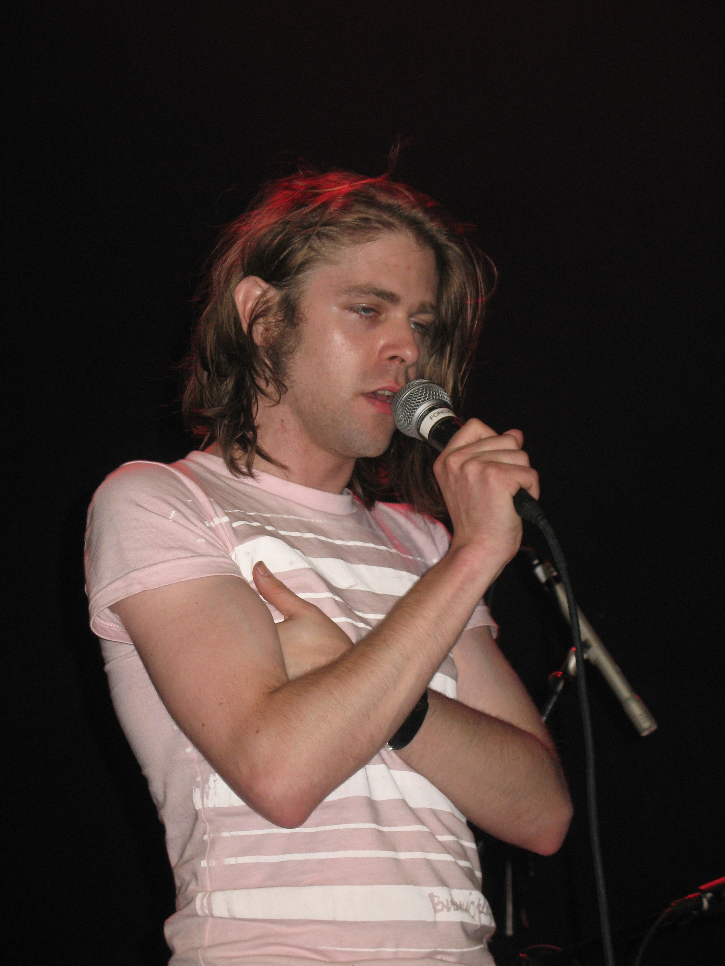 Ariel Pink